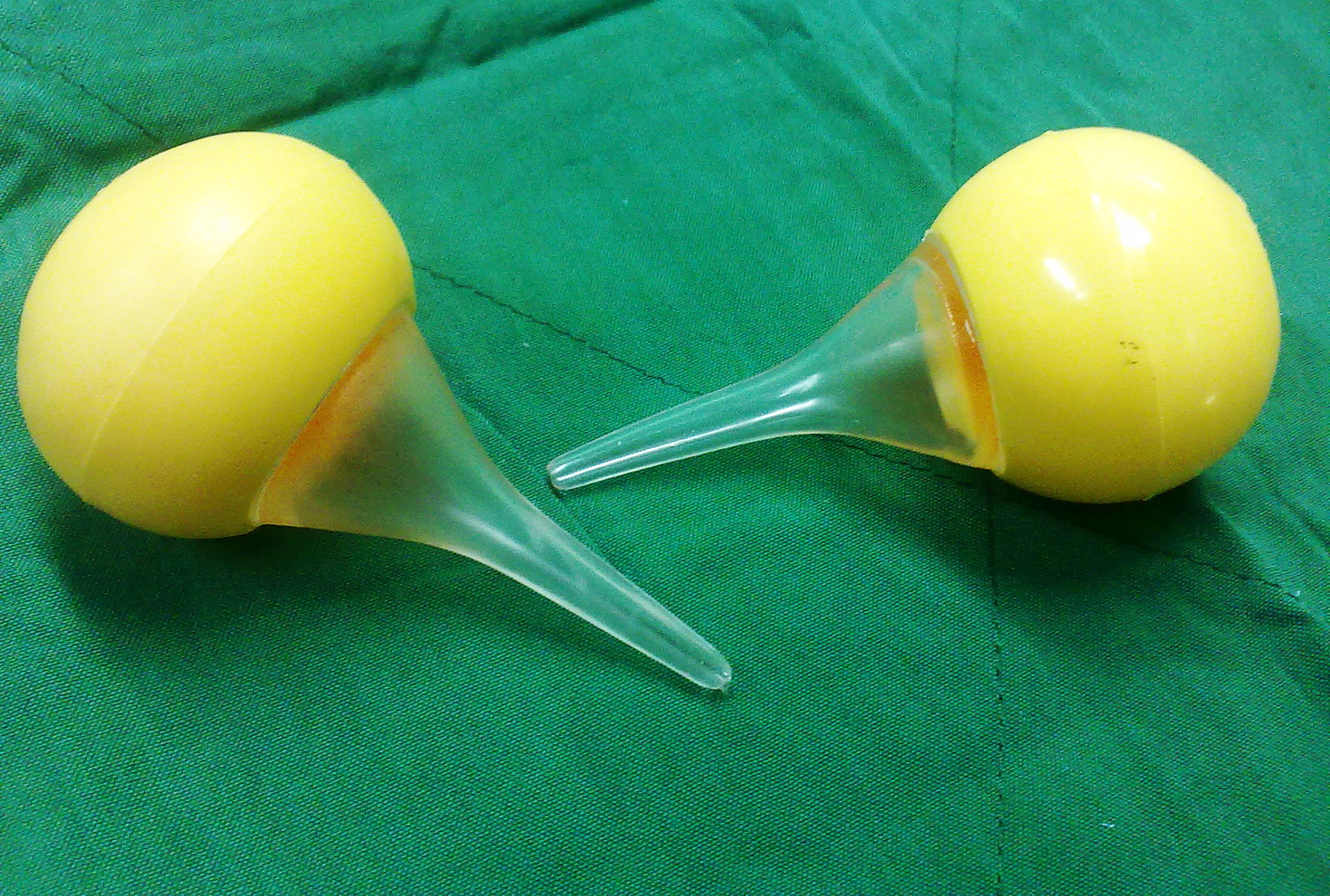 پوار : وسیله ای که جهت تخلیه ترشحات جنینی از بینی و دهان نوزادان در هنگام تولد مورد استفاده قرار می گیرد.